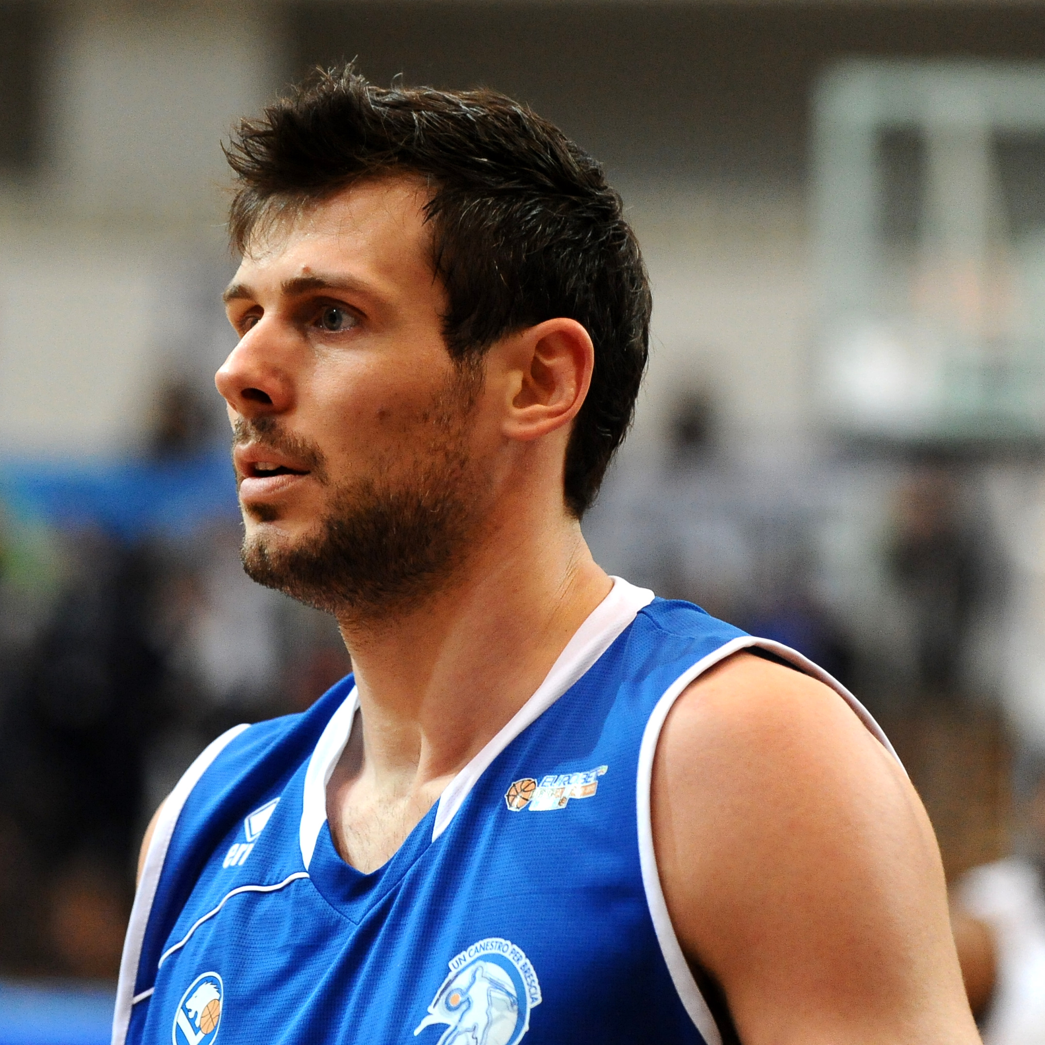 Nikos Barlos al PalaTrento durante una partita contro l'Aquila Basket Trento.